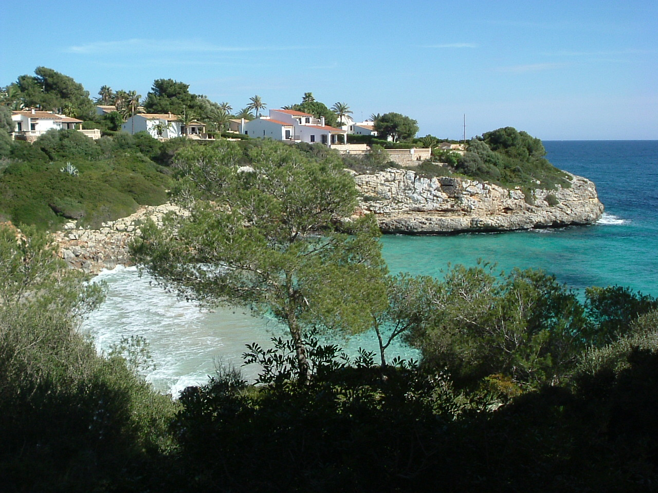 Cala Anguila, municipality of Manacor, Mallorca